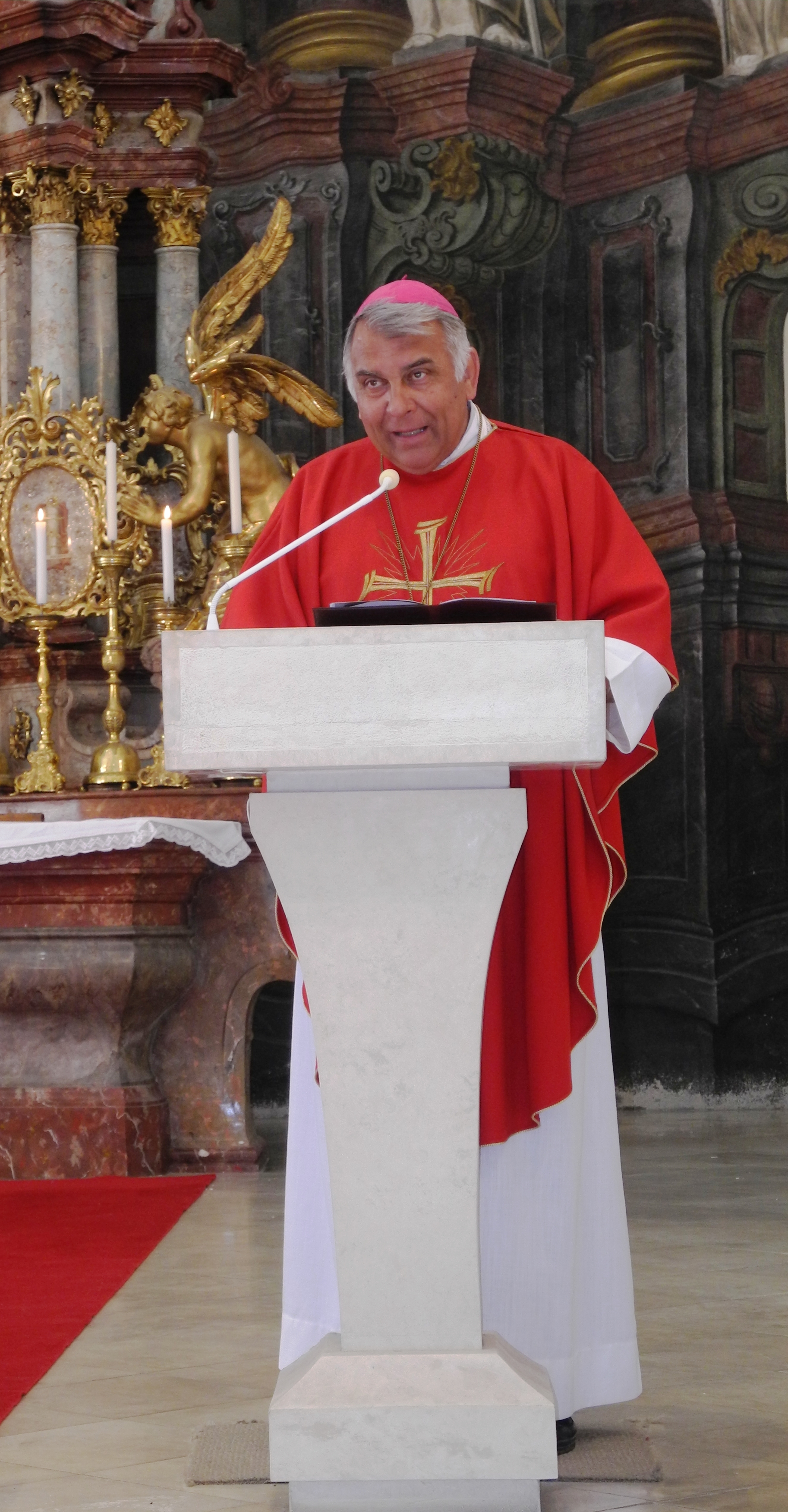 Mons. Josef Kajnek na Diecézním setkání seniorů a jejich přátel, 15. 6. 2013 v Hradci Králové